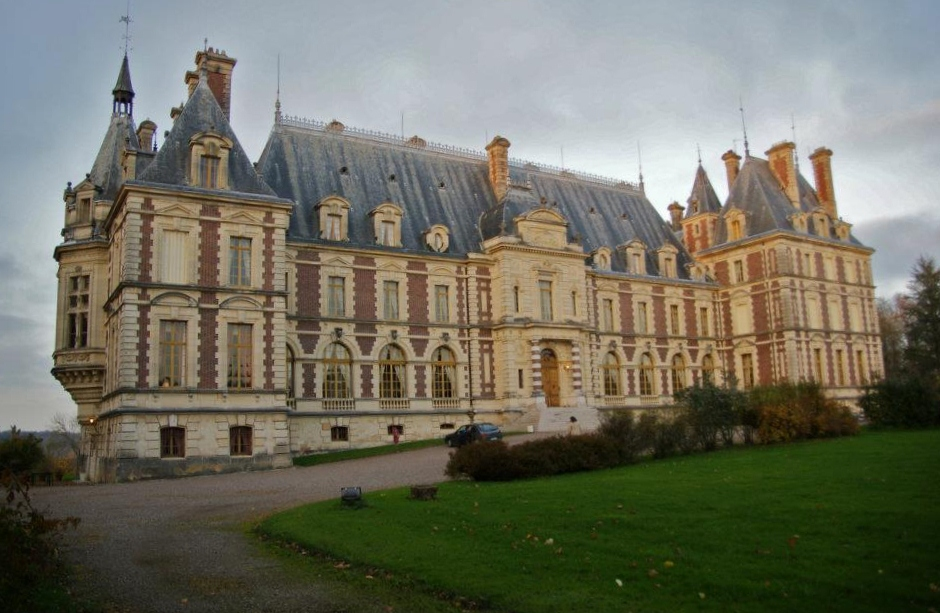 Château de Villersexel